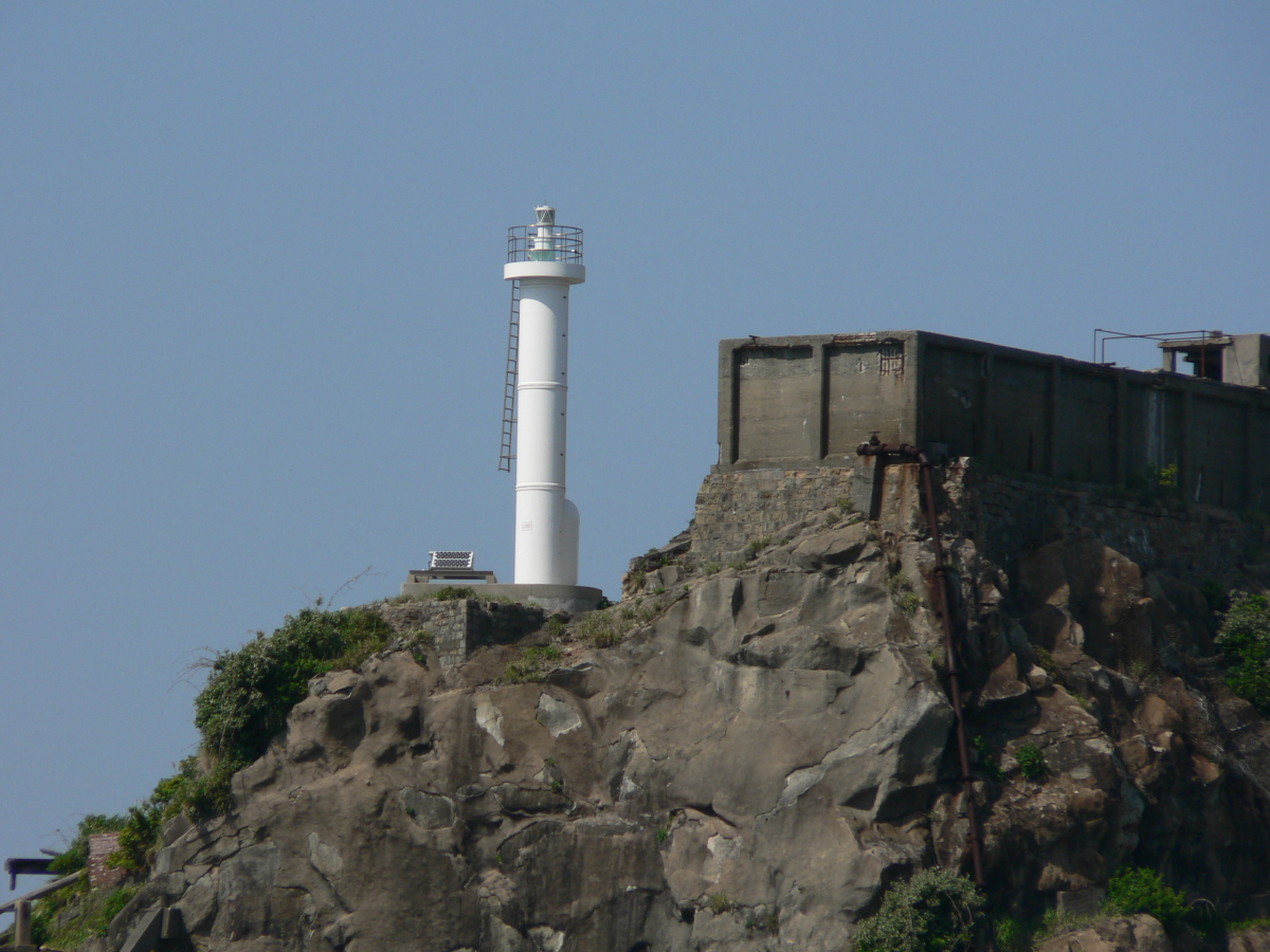 端島の貯水槽と、2代目の肥前端島灯台。